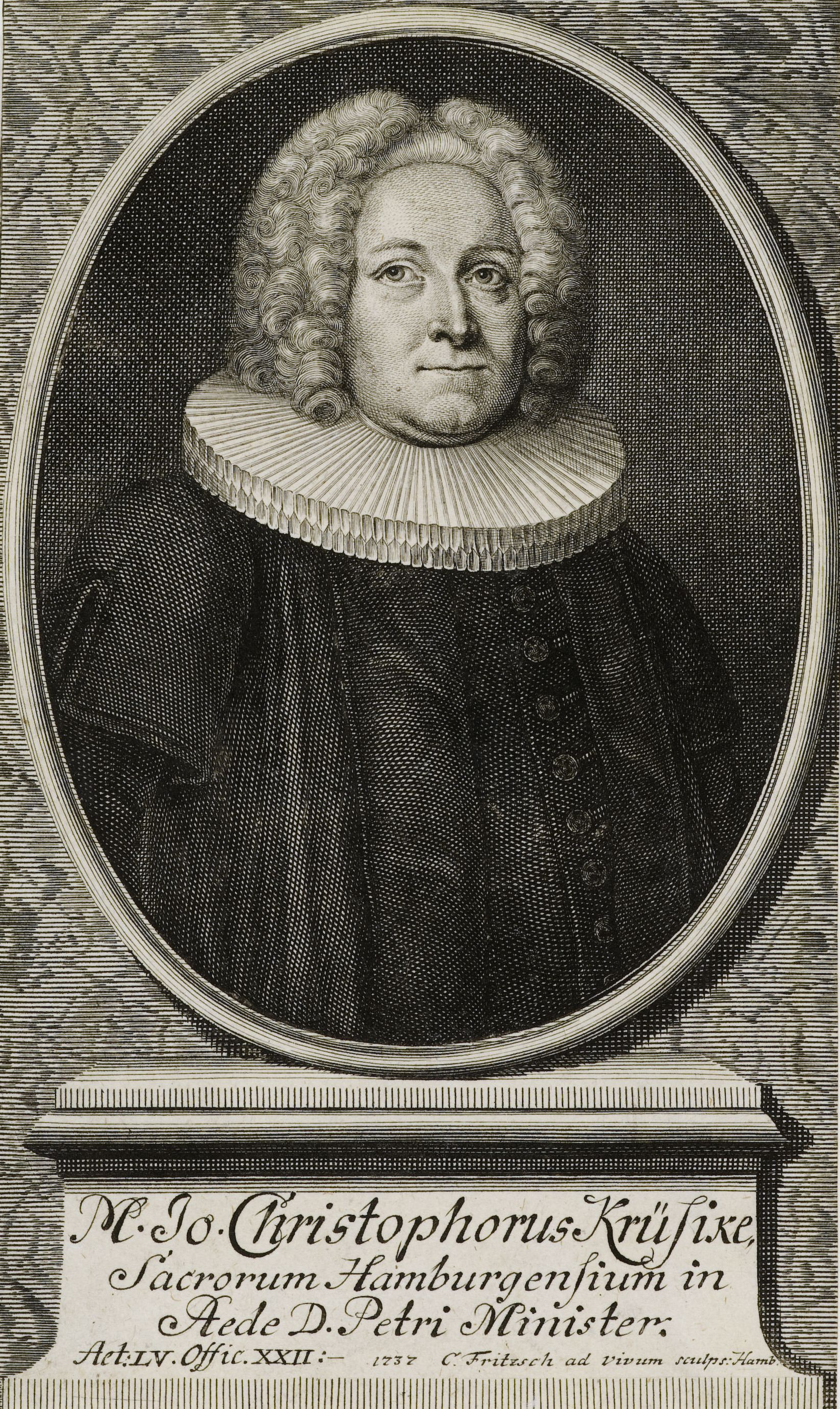 M . Jo. Christophorus Krüsike, Sacrorum Hamburgensium in Aede D. Petri Minister